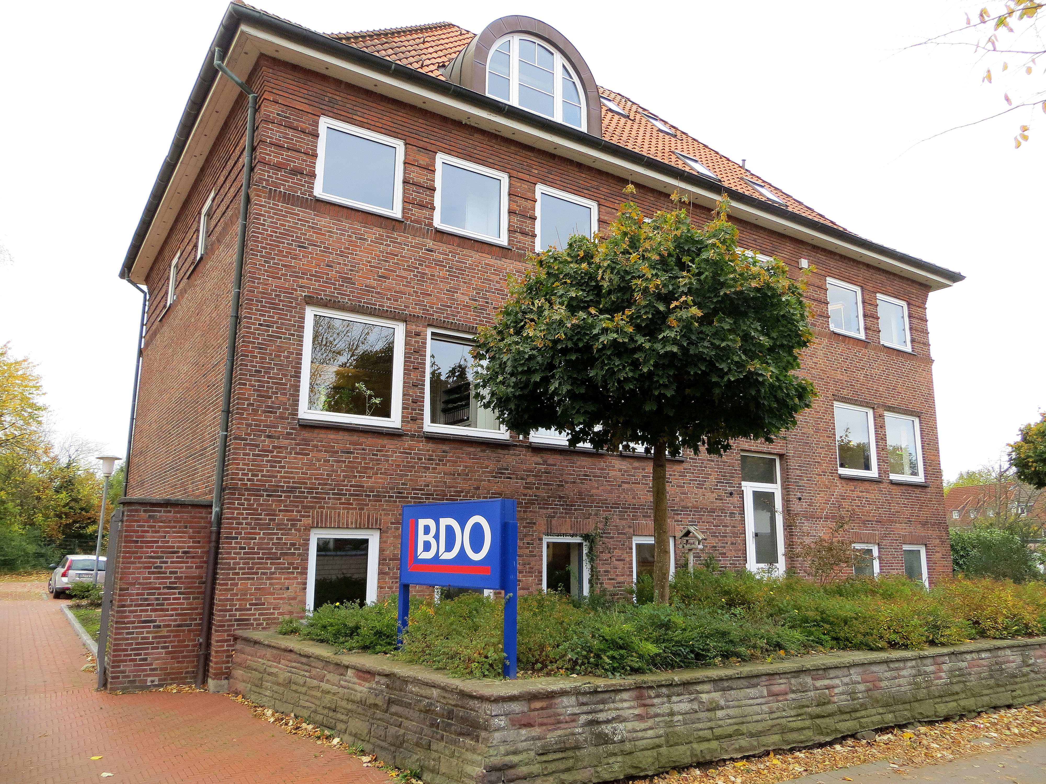 Das ehemalige Sendegebäude an der Straße Am Sender in Flensburg, nun BDO AG Wirtschaftsprüfungsgesellschaft, Bild 1